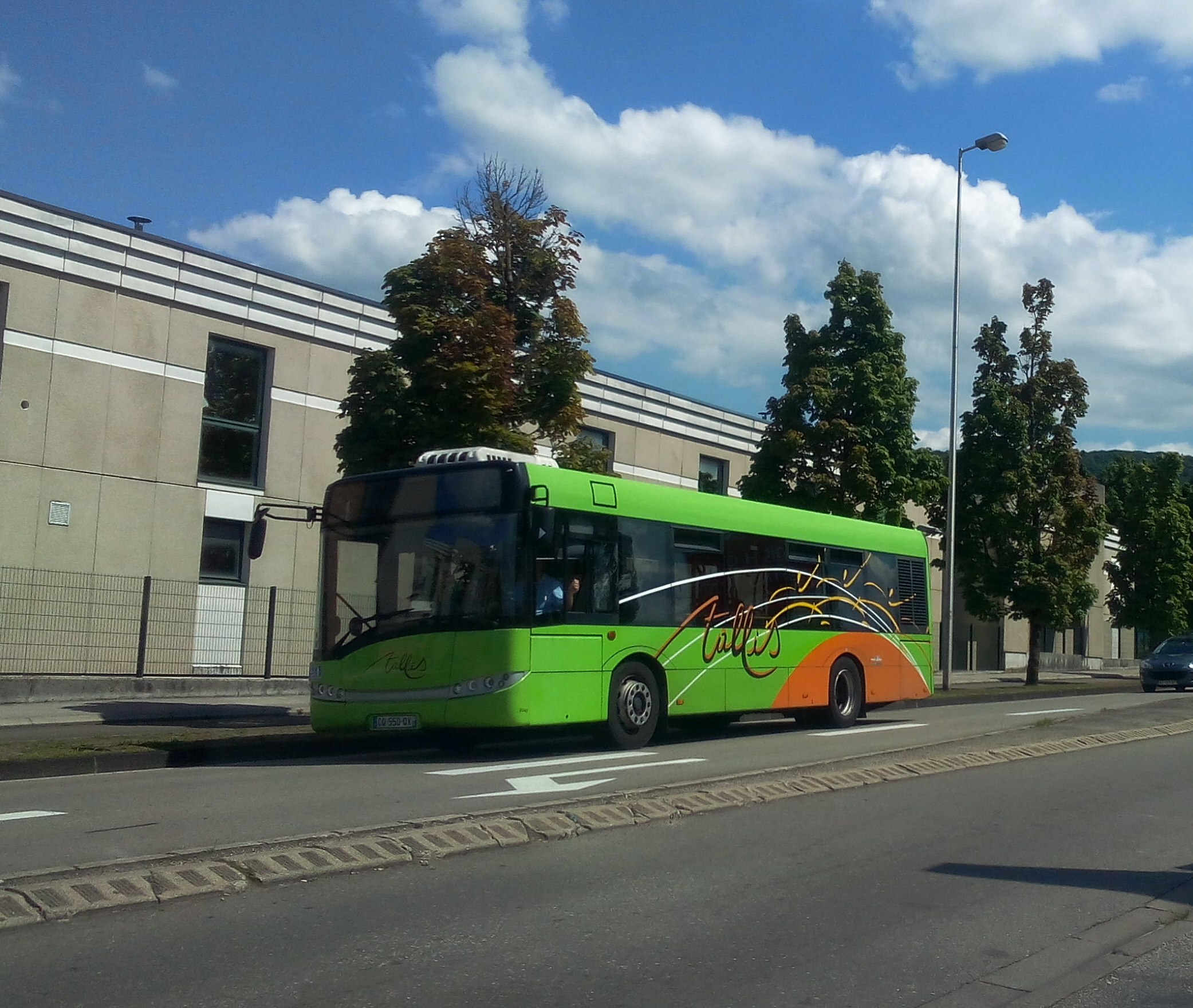 Solaris Urbino 10 du réseau de Lons-le-Saunier, 2015